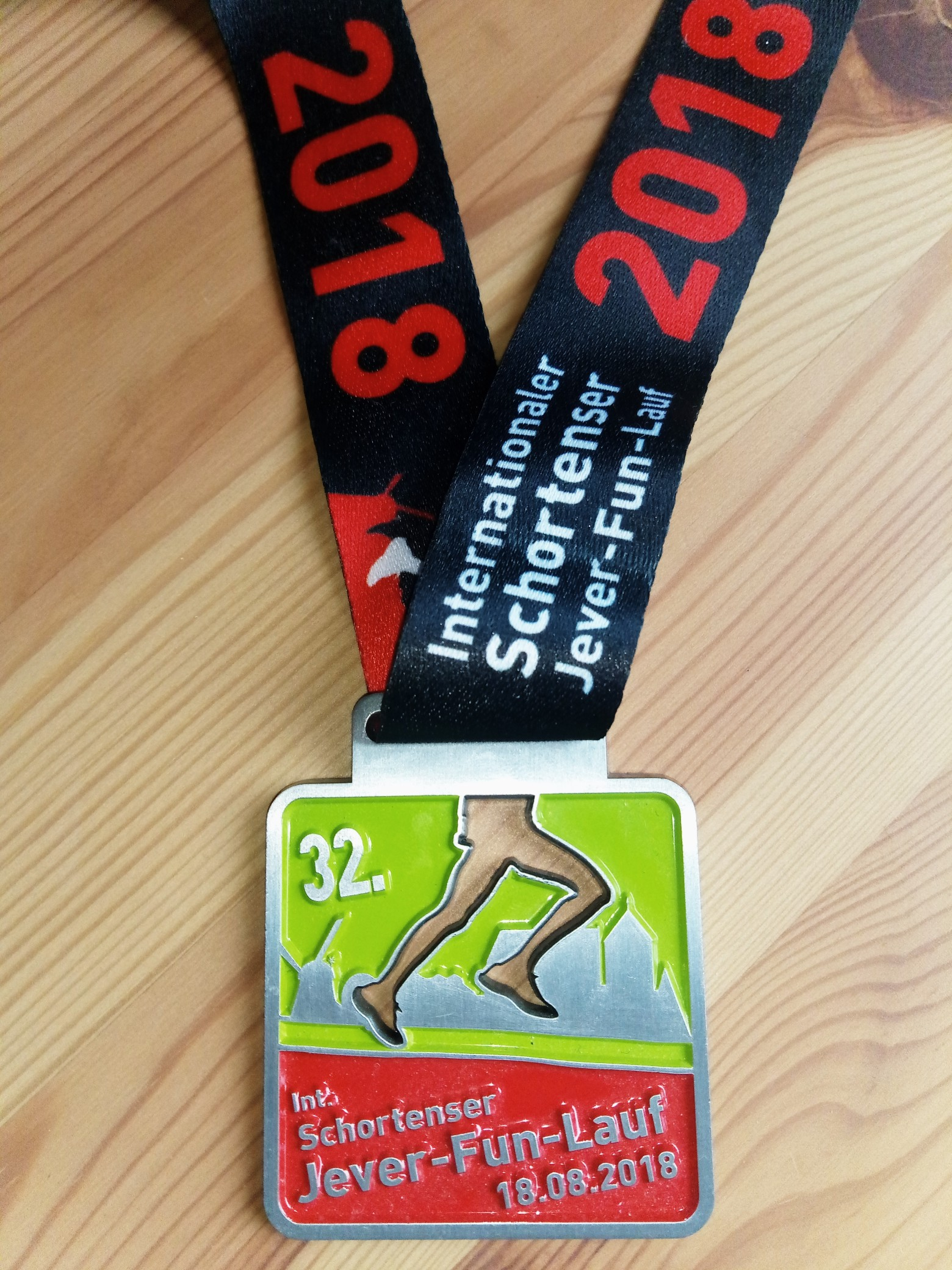 Finisher-Medaille des 32. Jever-Fun-Laufs 2018